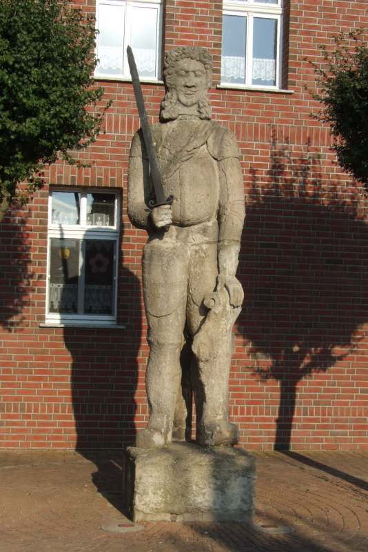 Der Roland in dem Altmarkdorf Buch nahe Tangermünde